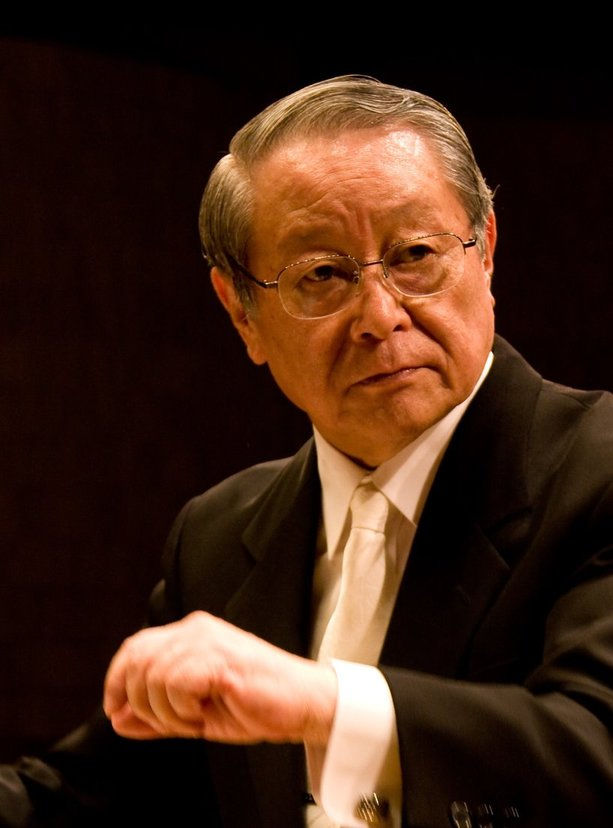 写真：尾形正茂